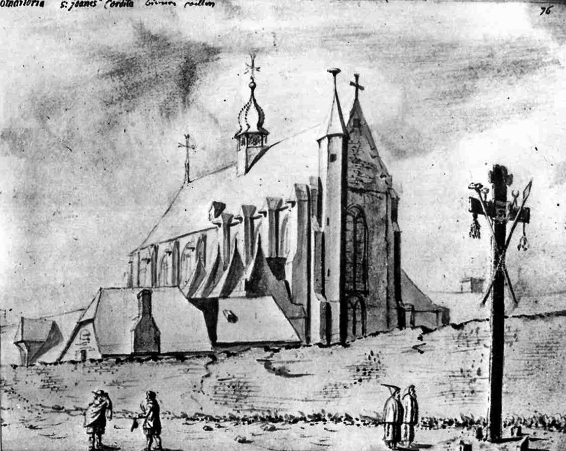 St. Johann und Cordula, Köln. Justus Finkenbaum um 1665 aus nordwestlicher Sicht gezeichnet. Das Blatt hat den Titel „s. joanes e cordila binnen coellen“